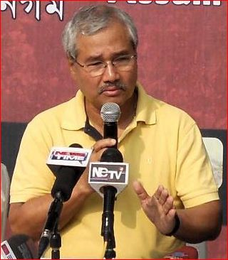 অসমীয়া: জাহ্নু বৰুৱা, অসমীয়া চলচ্চিত্ৰ পৰিচালক